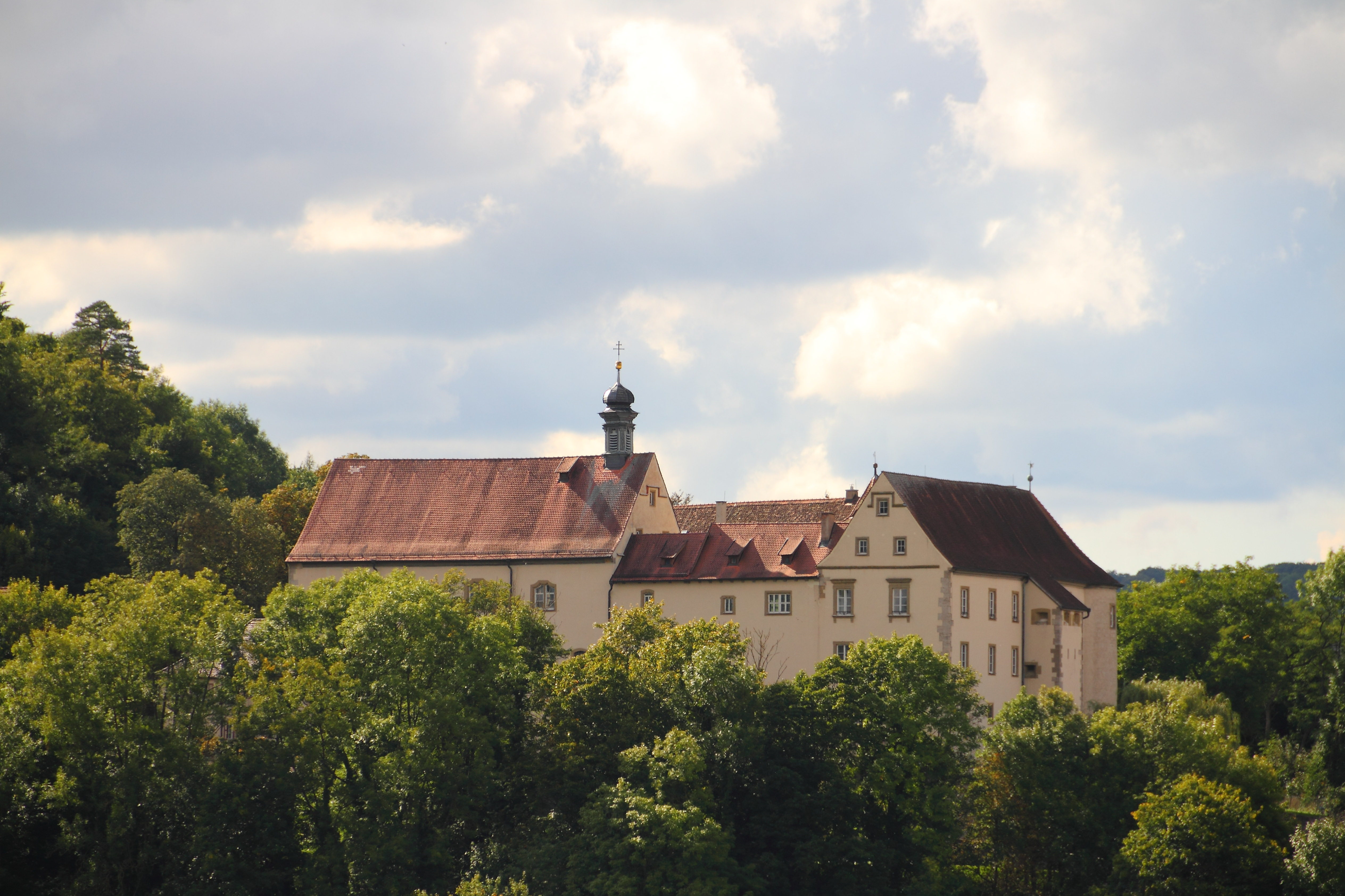 Schloss Haltenbergstetten von der Rehhofsteige gesehen.